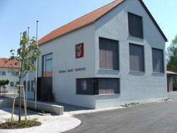 Rathaus der Gemeinde Markt Kaltental